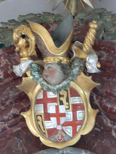 Wallfahrtskirche Maria zum Berge Karmel, Baitenhausen, Stadt Meersburg, Bodenseekreis Wendelinskapelle, Wendelinsaltar, Wappen des Bischofs Marquard Rudolph von Rodt